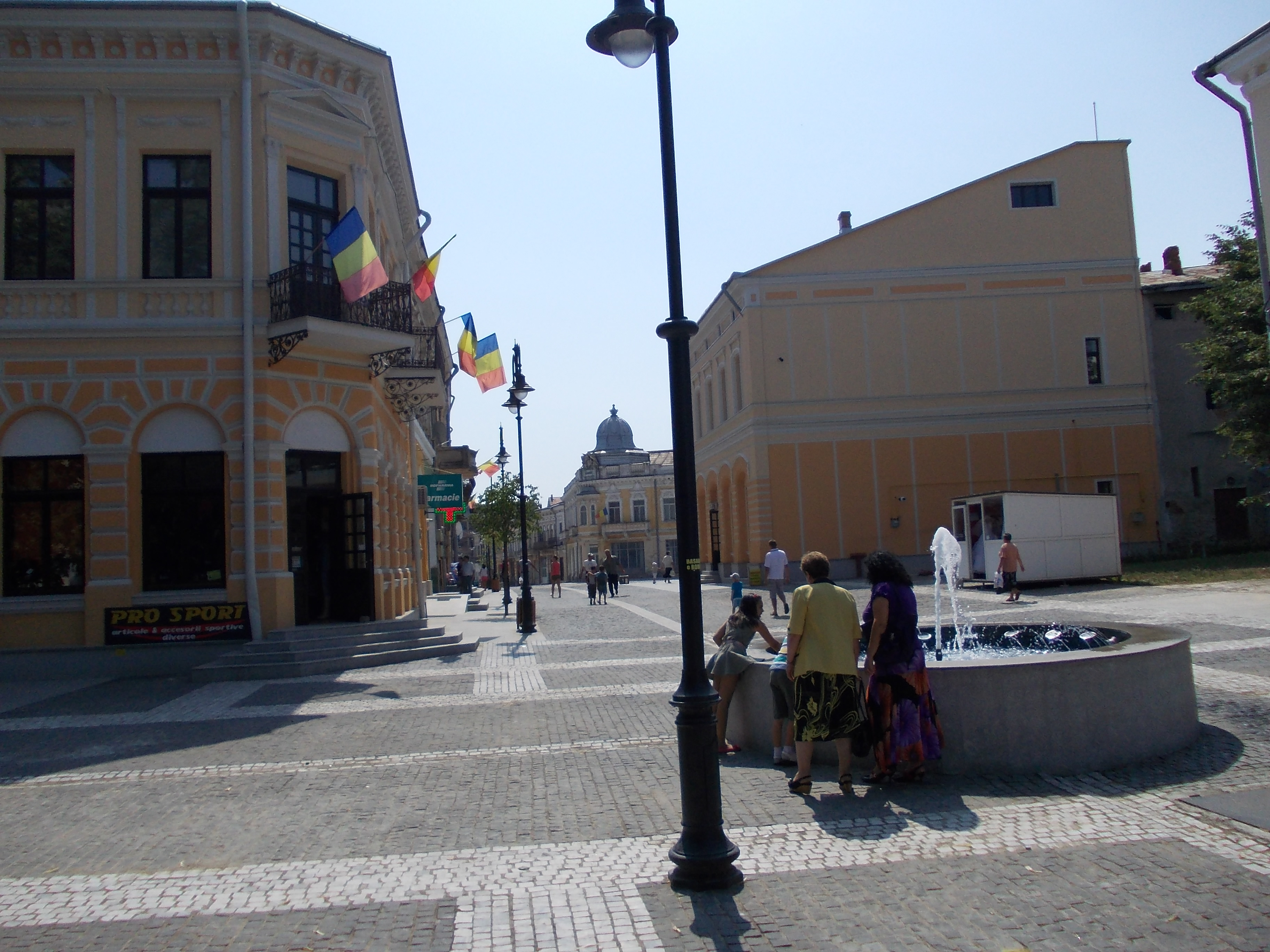 Centru Vechi din Botoşani